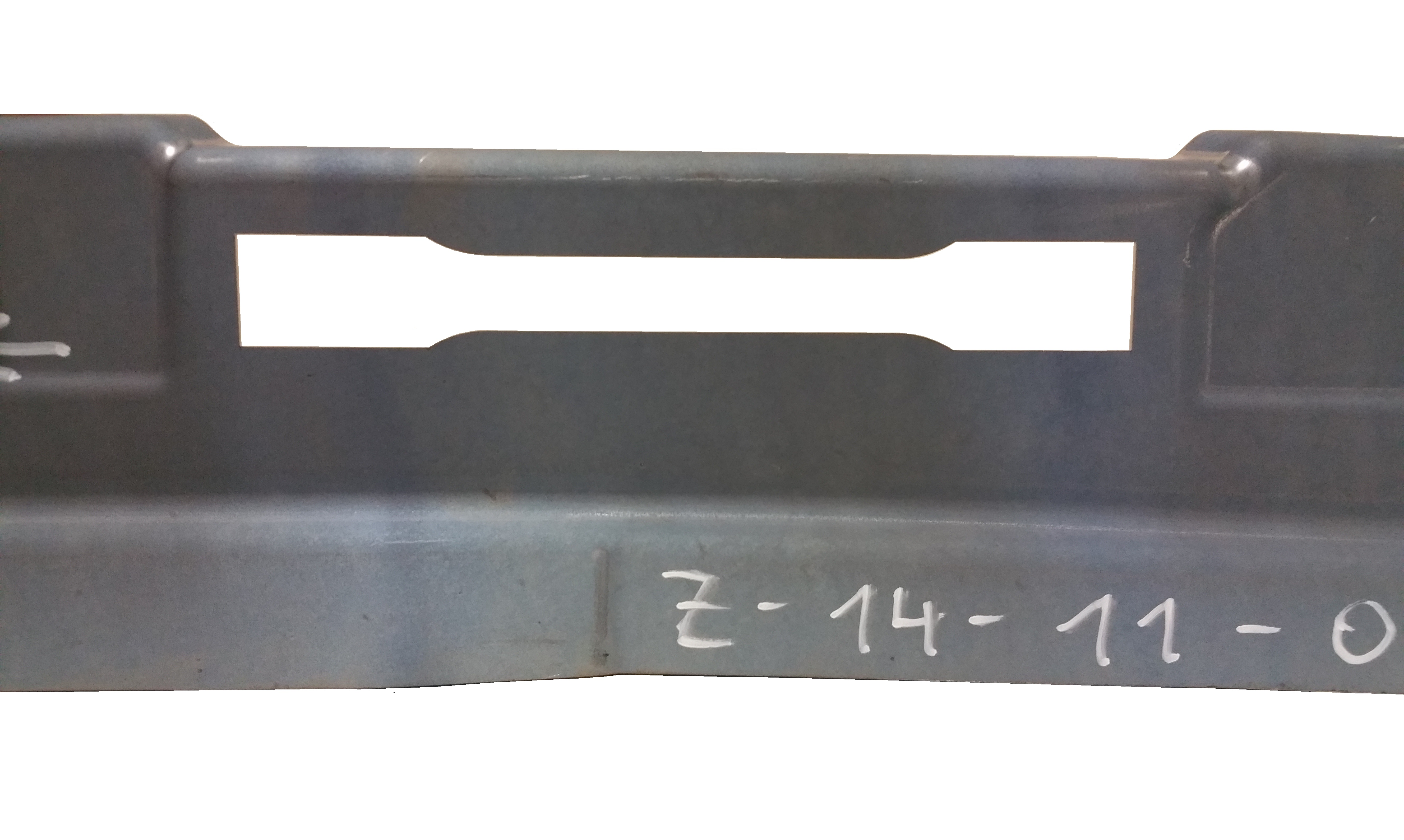 Zugprobe Presshärten